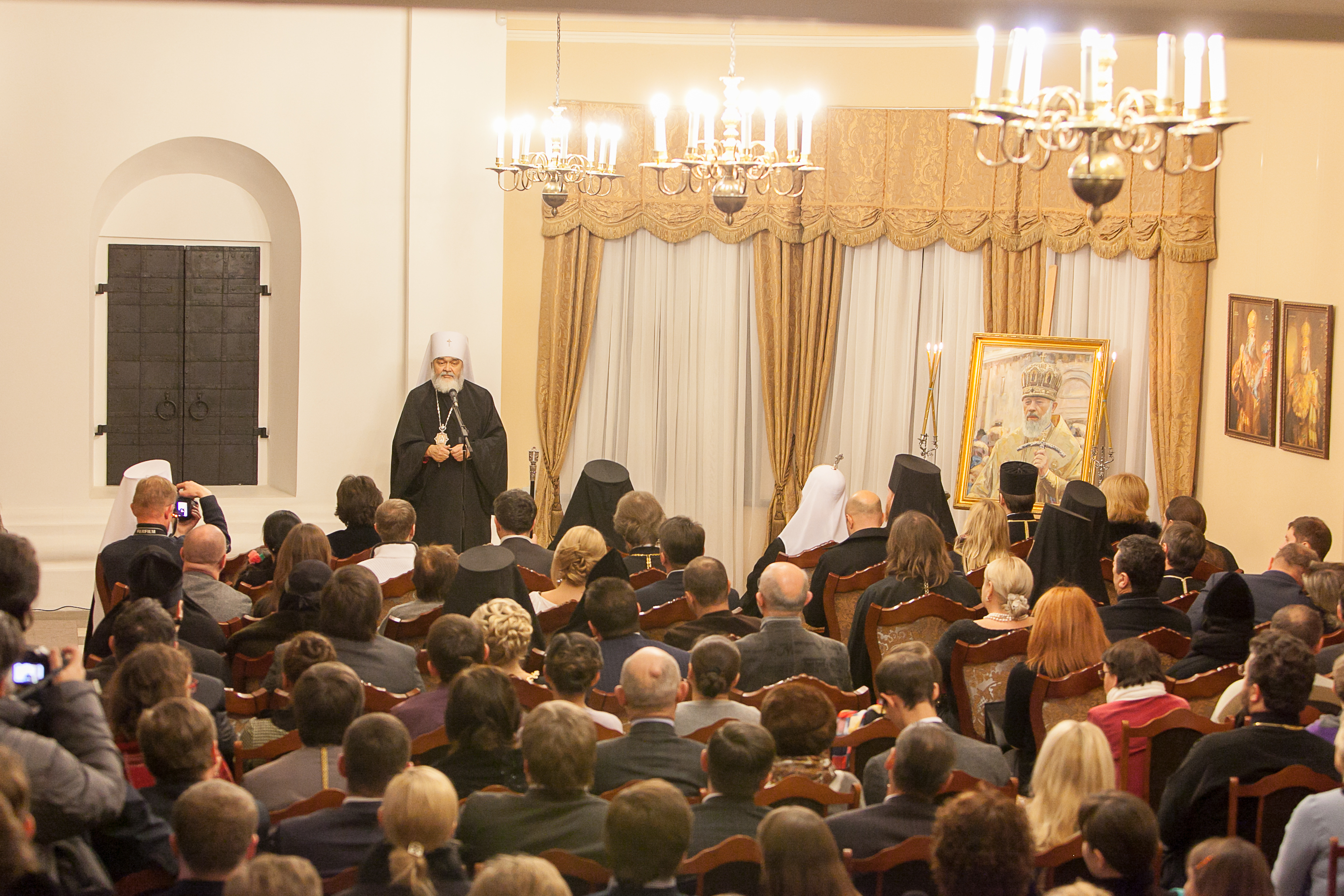 Вечір пам’яті Блаженнішого Митрополита Володимира, Київ, Свята Софія, 23 листопада 2014 р.